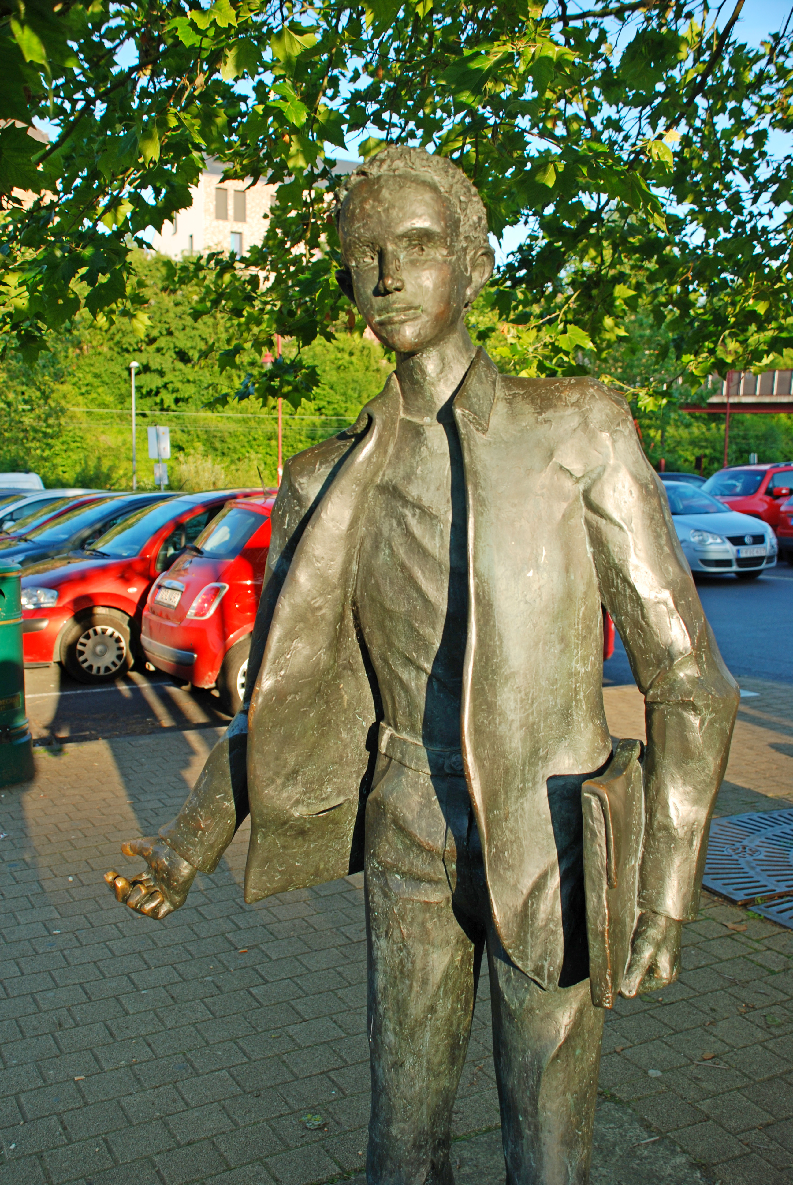 Belgique - Louvain-la-Neuve - Augustin l'auto-stoppeur (sculpture de Gigi Warny 1999)